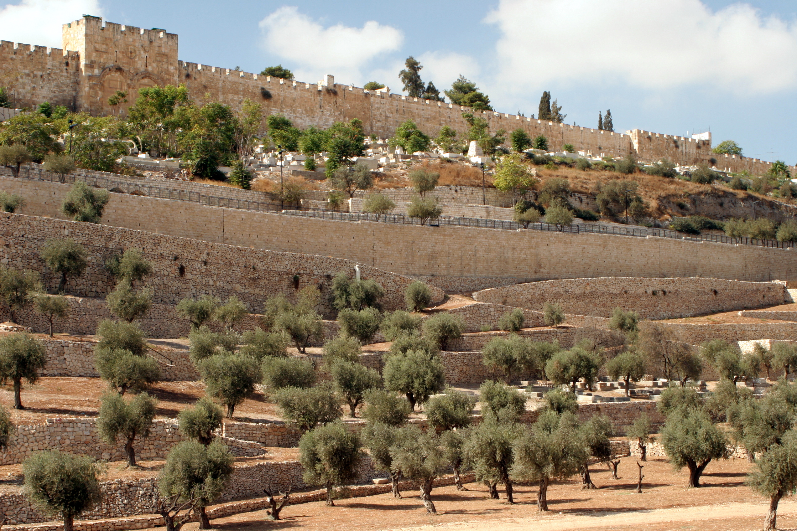 IMG_4618 Jerusalem